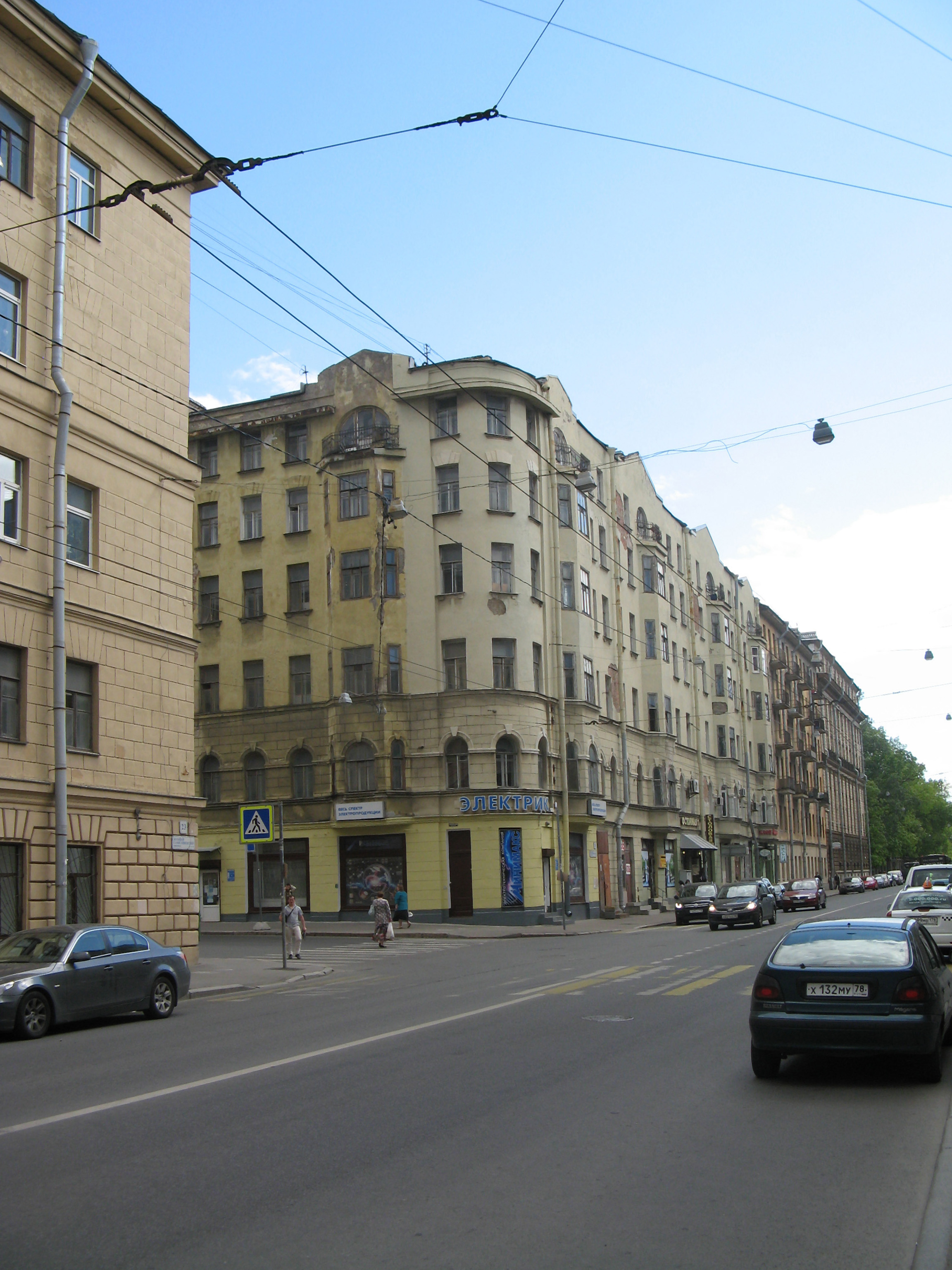 Доходный дом М. С. Плотникова. Санкт-Петербург, Большой Сампсониевский проспект, д. № 21 / Выборгская улица, д. № 1